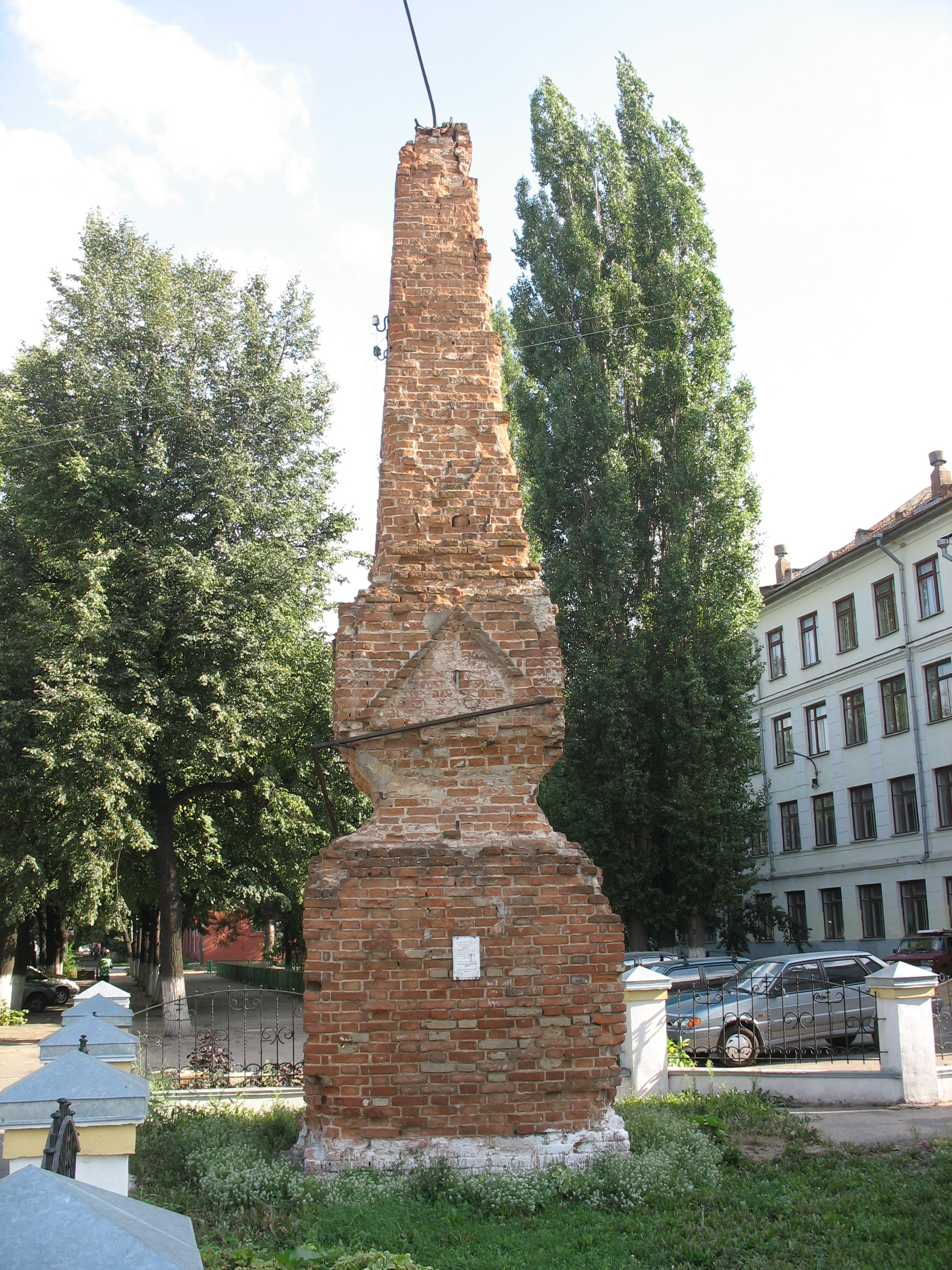 Левый входной пилон бывшего Чугуновского кладбища Надпись на табличке: С начала XIX века на этом месте находили последнее упокоение тысячи достойных сынов и дочерей России, пока в середине XX века потомки не осквернили и не уничтожили останки предков. Да простят мертвые живых, да не допустят повторения живые. Да упокоит Господь души усопших.